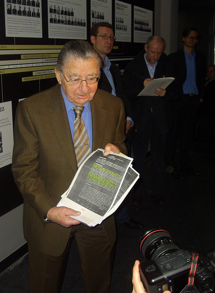 Arno Hamburger bei der Eröffnung der Ausstellung "Memorium Nürnberger Prozesse".